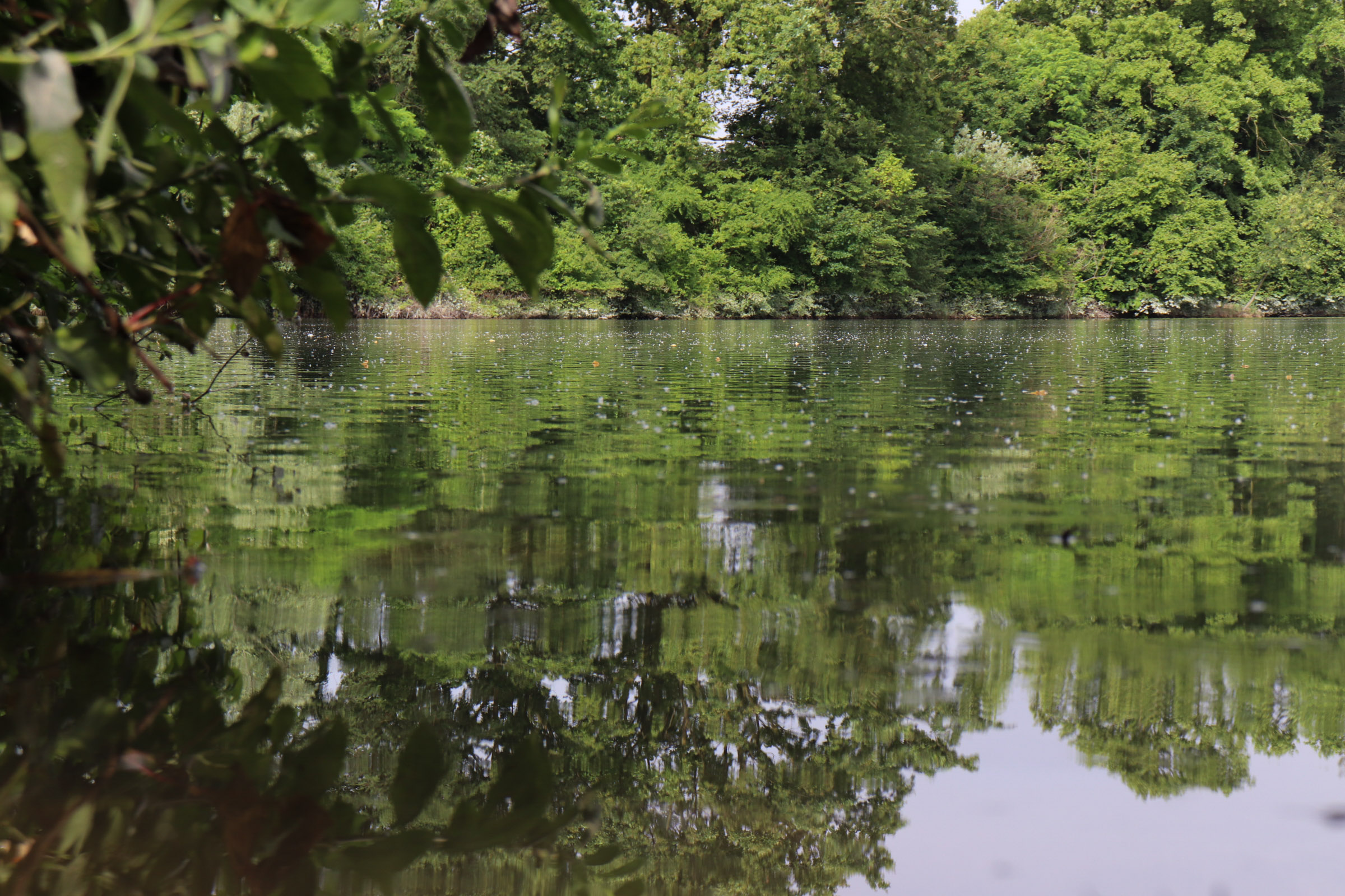 Ex Cave di Martellago (Q55719796)